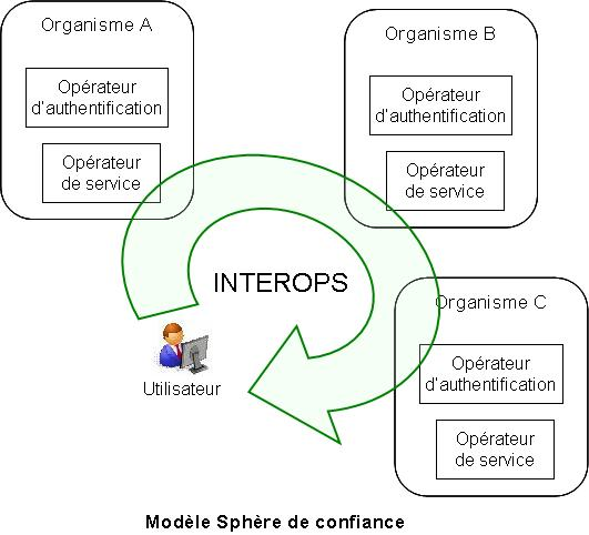 Schéma du modèle sphère de confiance